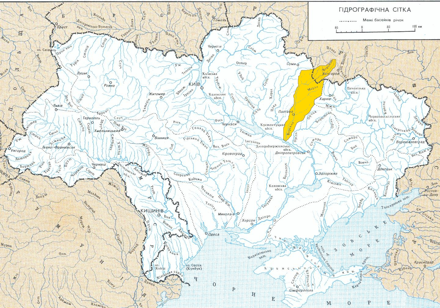 Бассейн реки Ворскла.